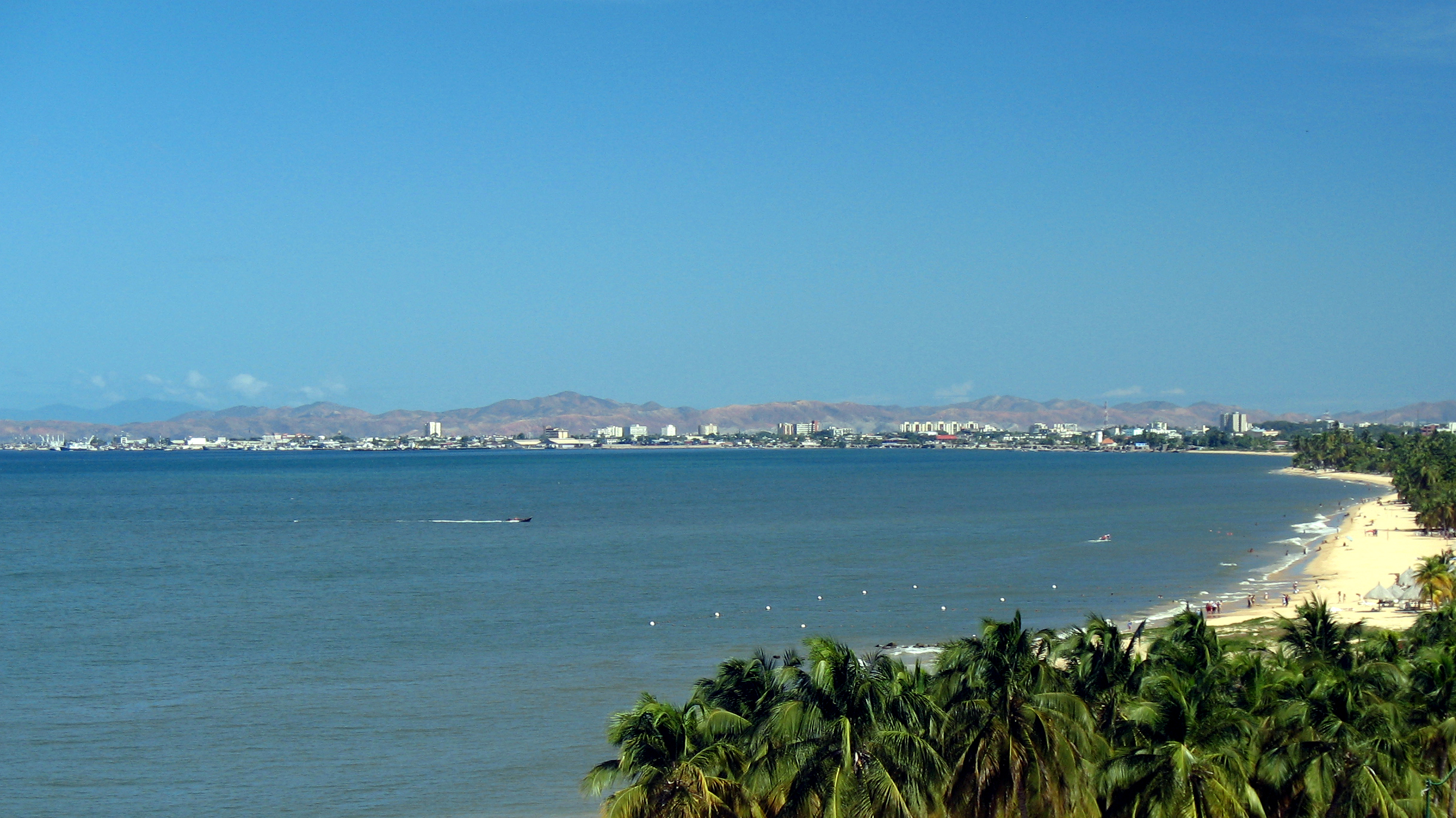 Cumaná